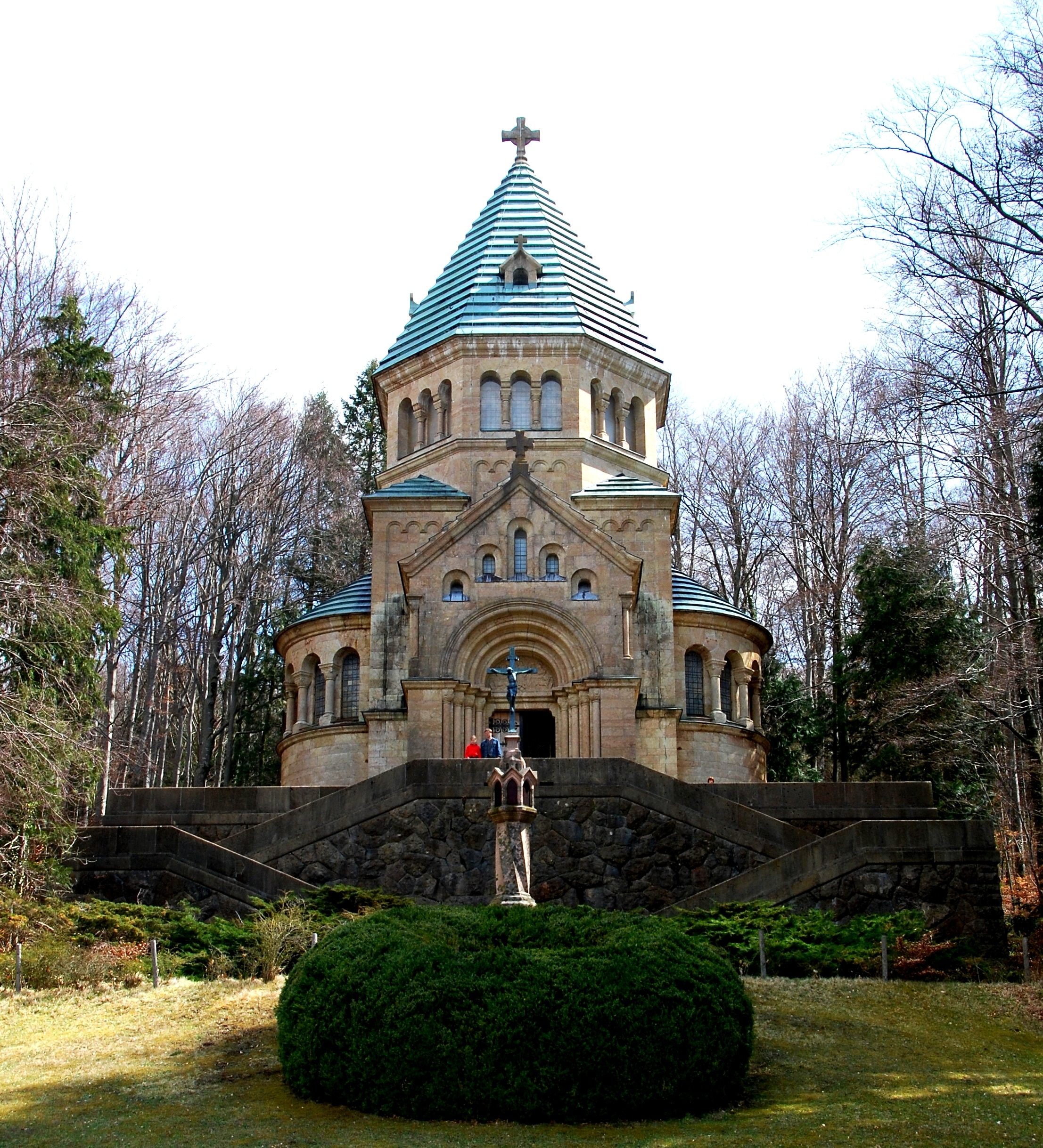 Berg am Starnberger See, Votivkapelle. Kapelle zum Gedächtnis an König Ludwig II. von Bayern; erbaut 1896-1900 von Julius Hofmann.